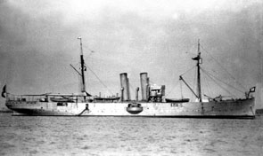 Foto del crucero Lima.